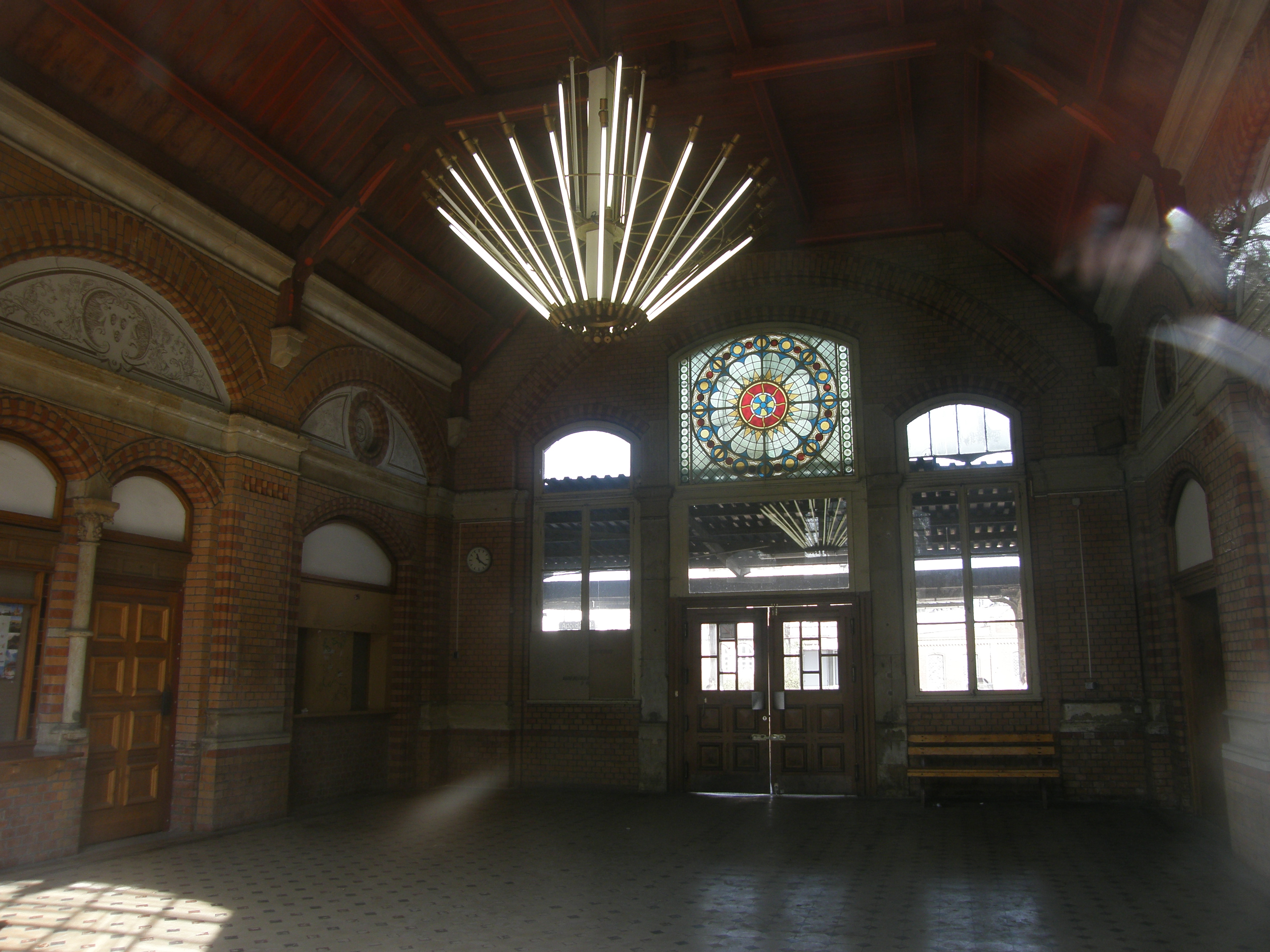 Stadt Apolda - Blick in die Halle des Bahnhofsgebäudes (leider war das Gebäude verschlossen, aber es lohnt sich das nochmal zu versuchen)